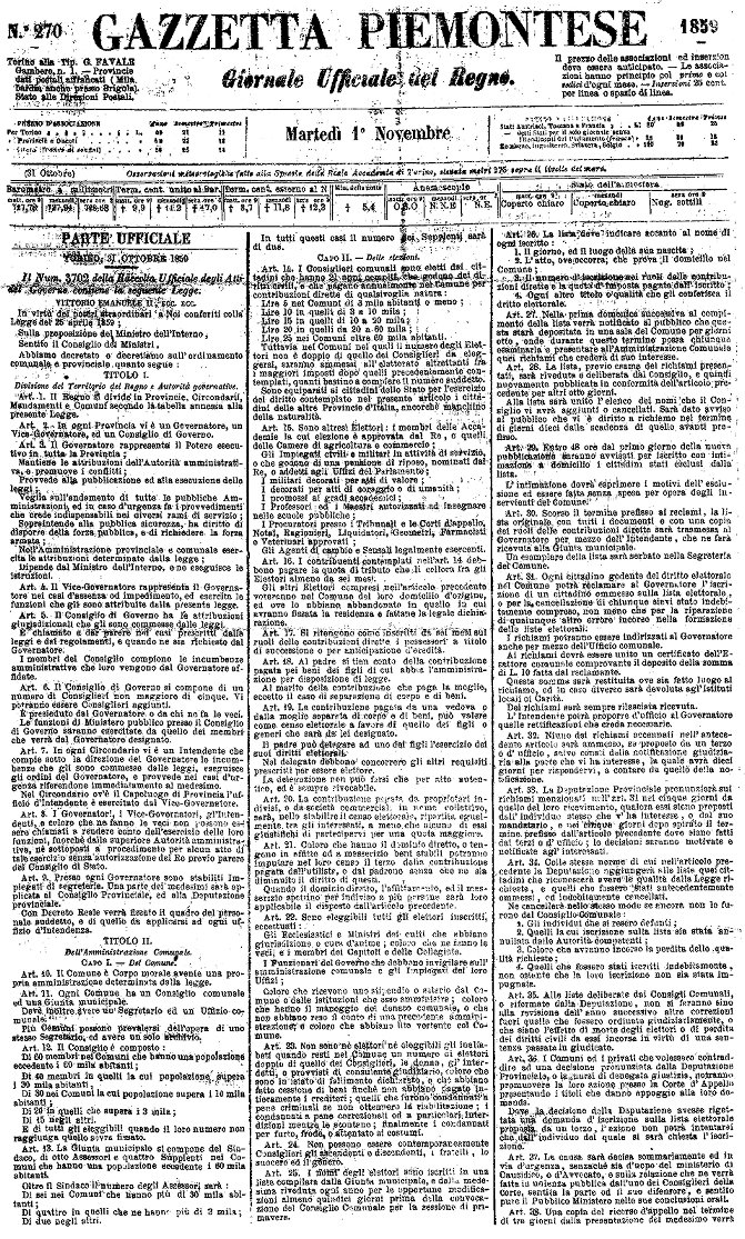 copertina della Gazzetta Piemontese con la Legge Rattazzi Legge 23 ottobre 1859 n. 3702